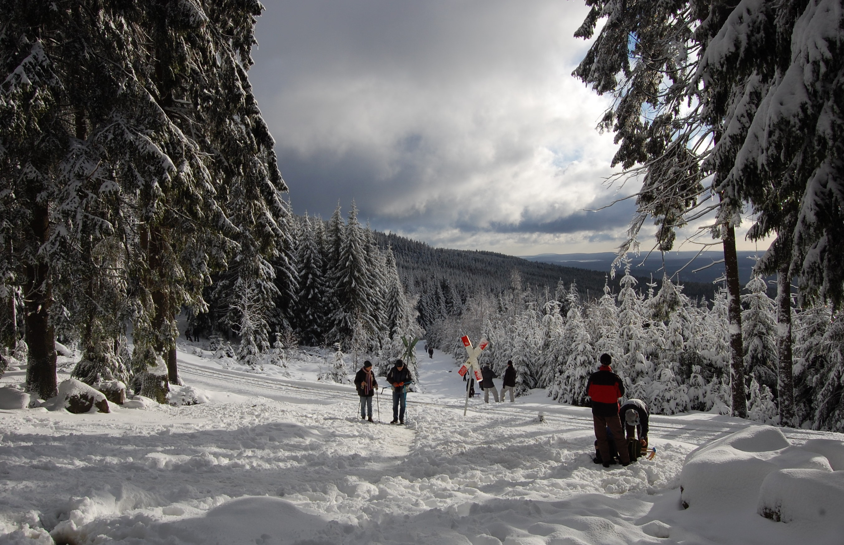 Blick über die Alte Bobbahn bei Schierke vom Bahnpatallelweg aus